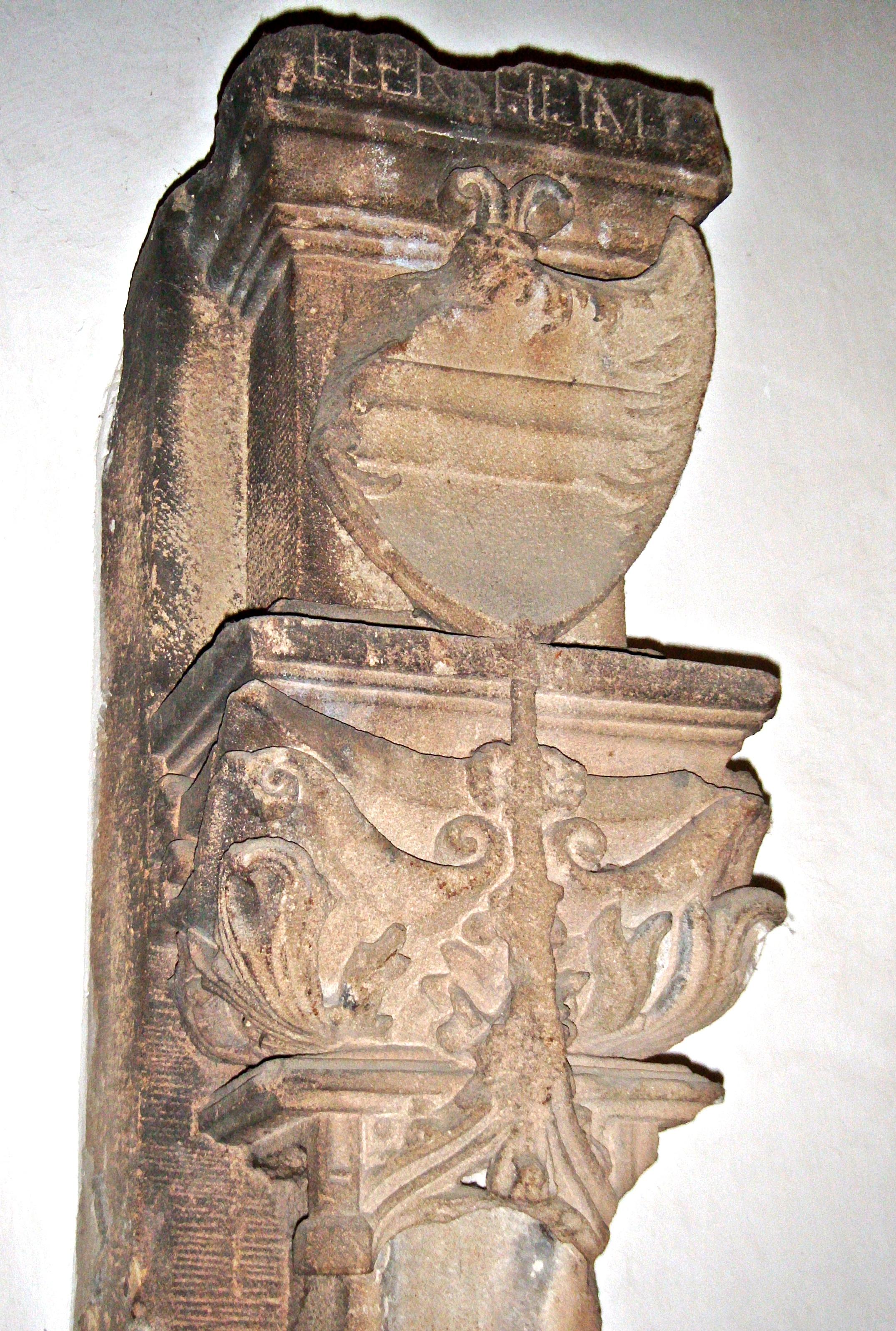 Wappenstein derer von Flersheim im Speyerer Dom